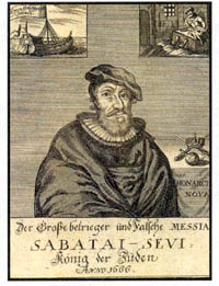 Retrat de Shabbetai Zsevi